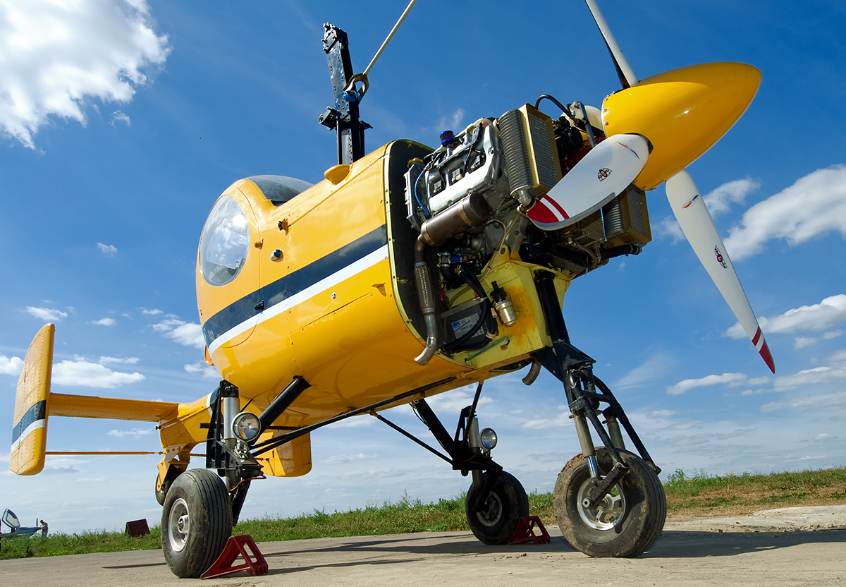 Autogyro